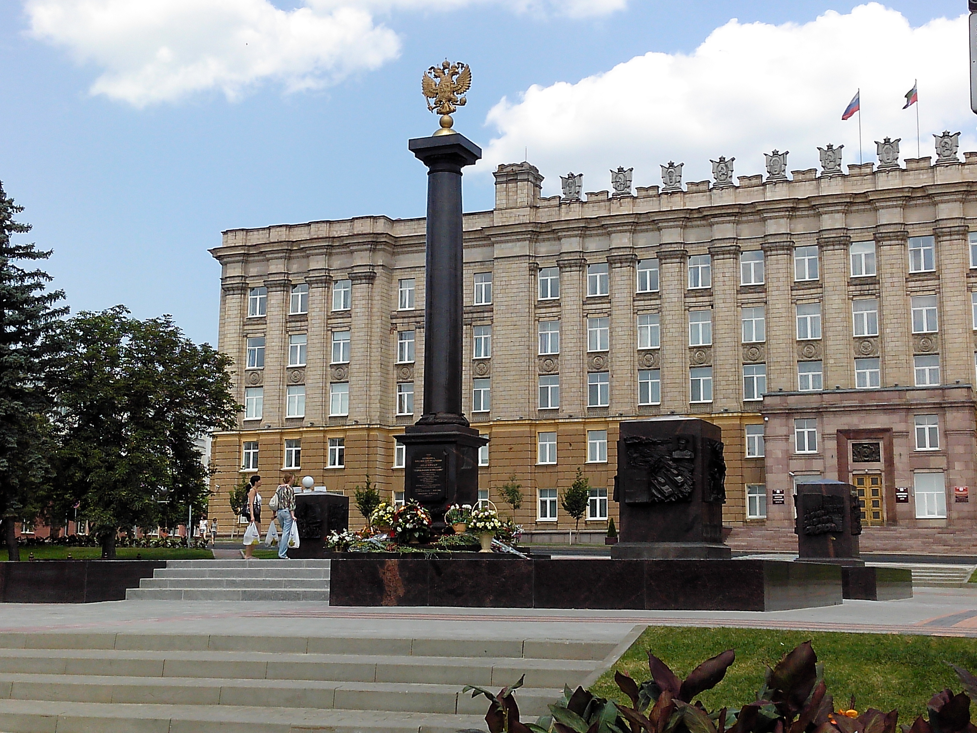 Стела «Город воинской славы» на фоне здания Администрации Белгородской области. Белгород.